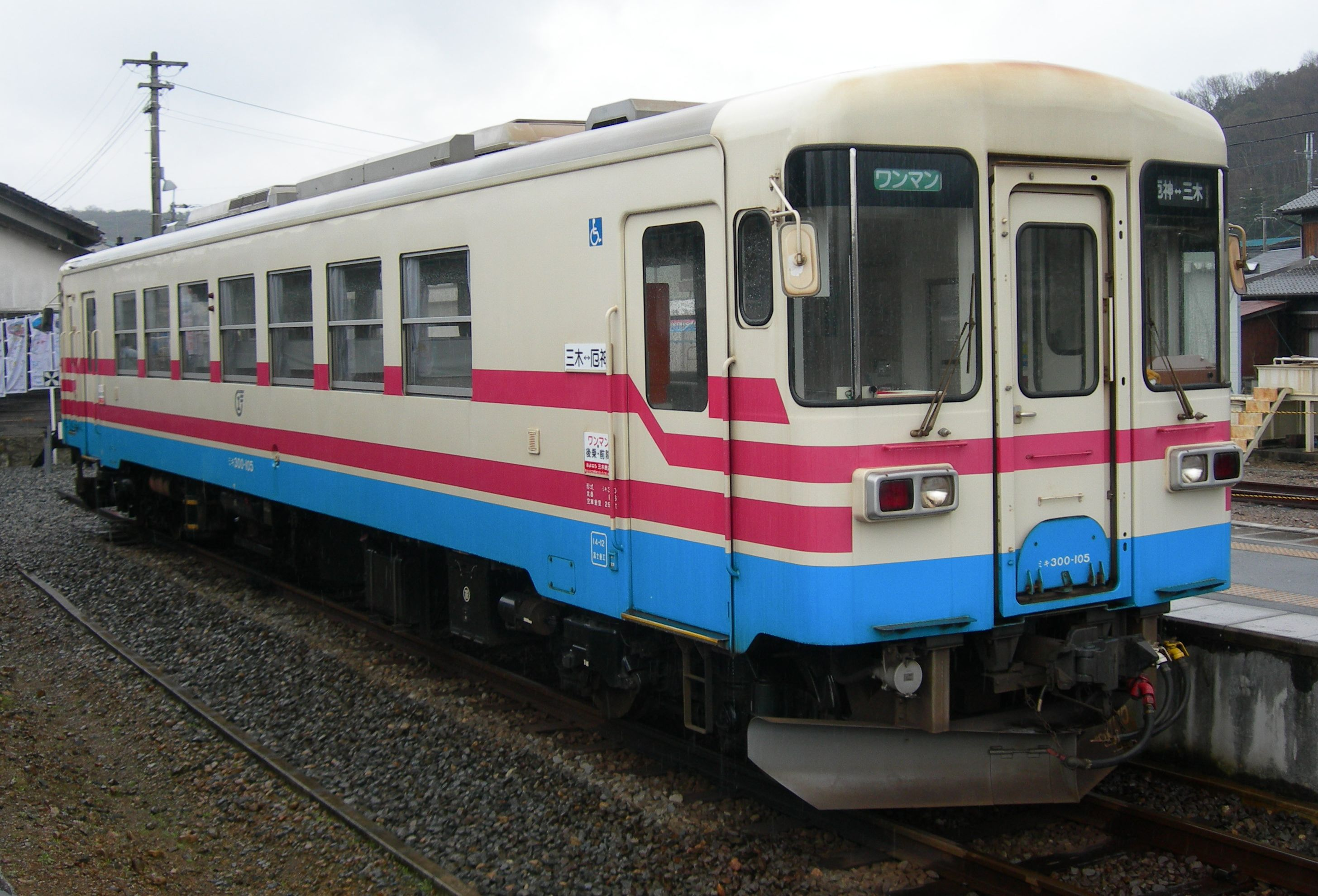 三木鉄道ミキ300-105